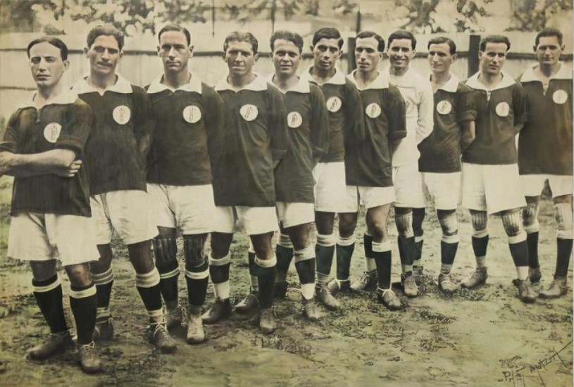 Palestra Itália (antigo nome da Sociedade Esportiva Palmeiras) Campeão Paulista de em 1920